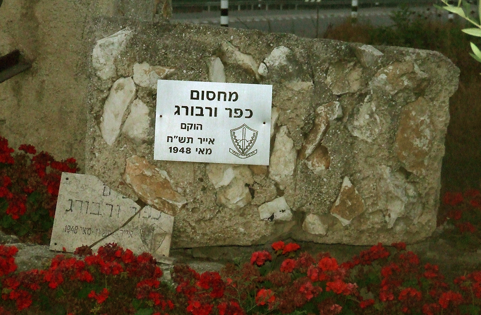 מחסום הכניסה לכפר ורבורג